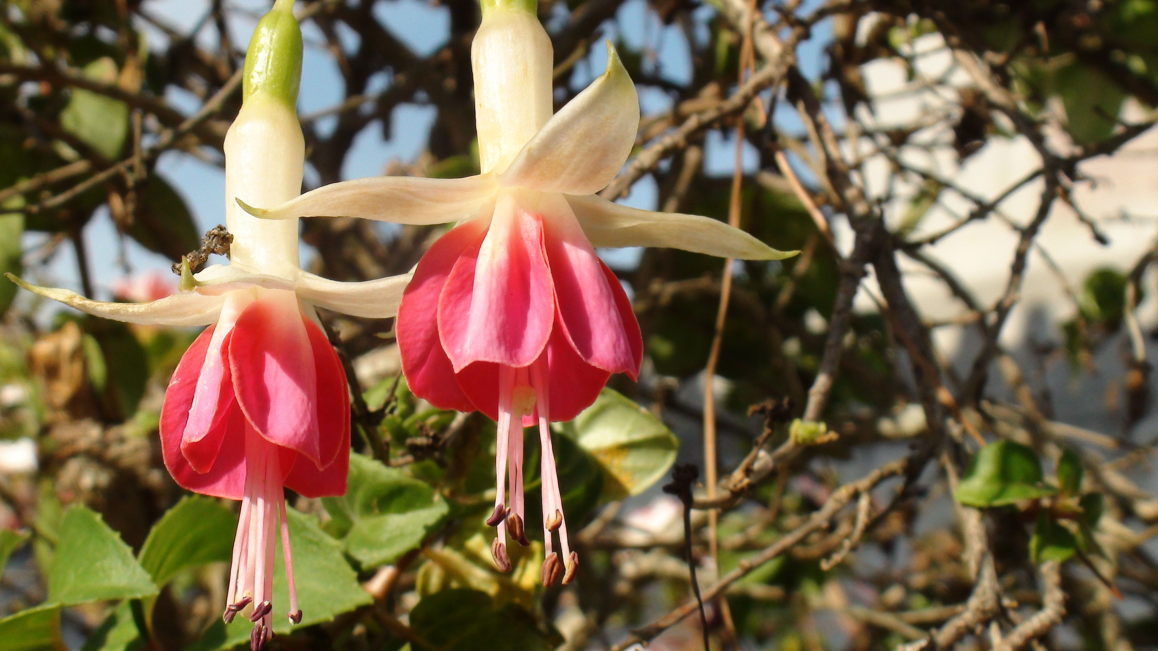 Brincos-de-princesa numa manhã de sol.